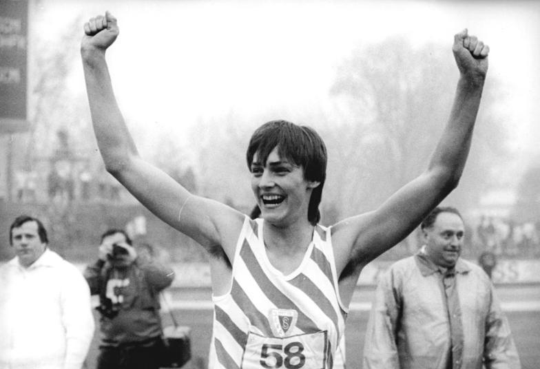 Heike Daute ADN-ZB Kasper 13.5.84 Gera: Leichtathletik-Sportfest in Jena. Die 20jährige Weltmeisterin Heike Daute (SC Motor Jena) jubelt. Mit 7,29 m erzielte sie einen neuen DDR-Rekord im Weitsprung. Sie übertraf damit ihre eigene Rekordmarke aus dem vergangenen Jahr um 15 Zentimeter.